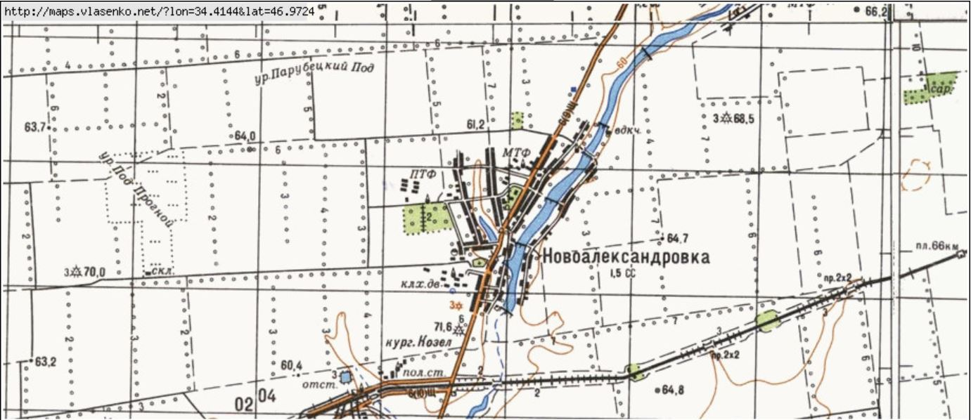 Село Новоолександрівка на мапі СРСР.